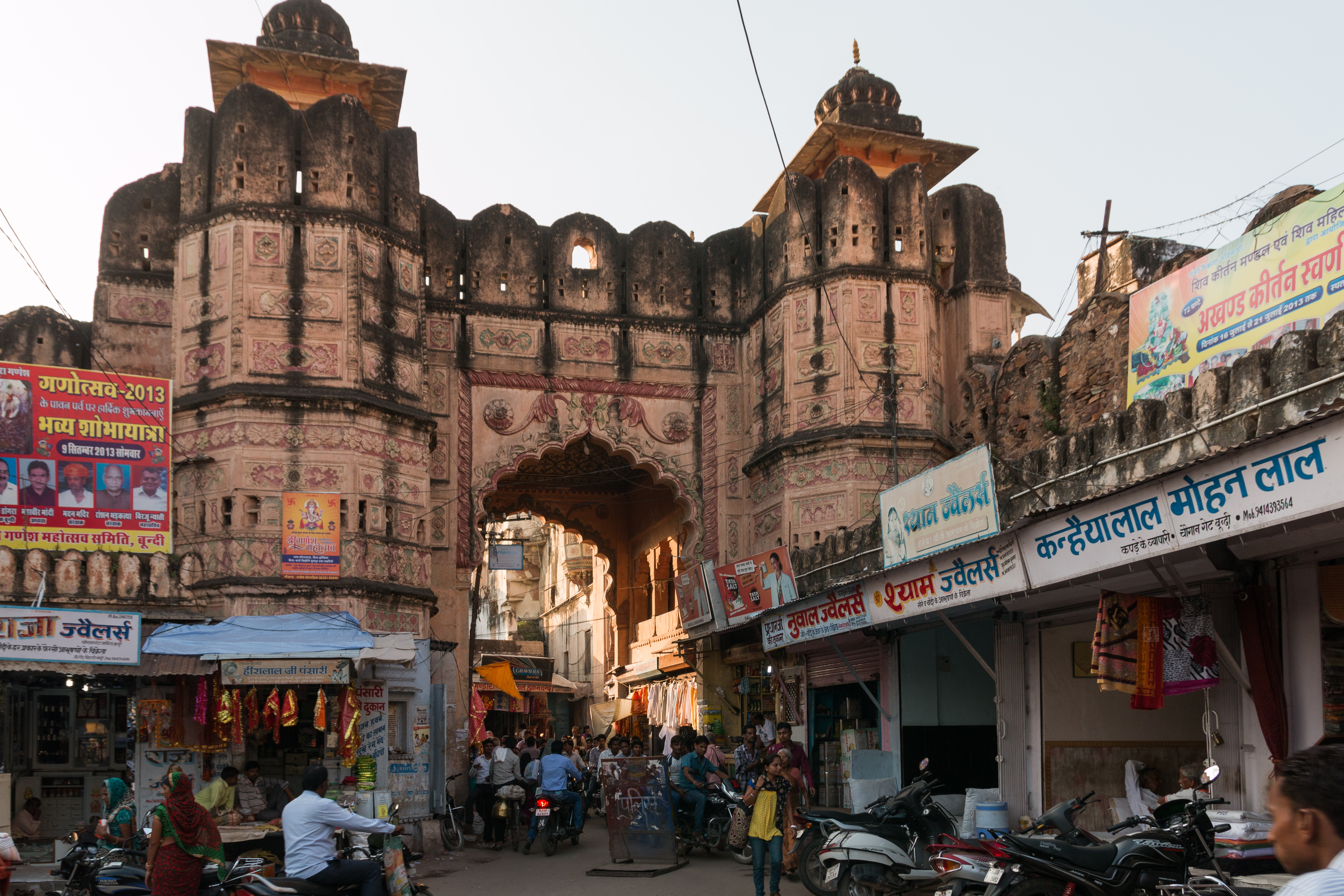 Ghogan gate.